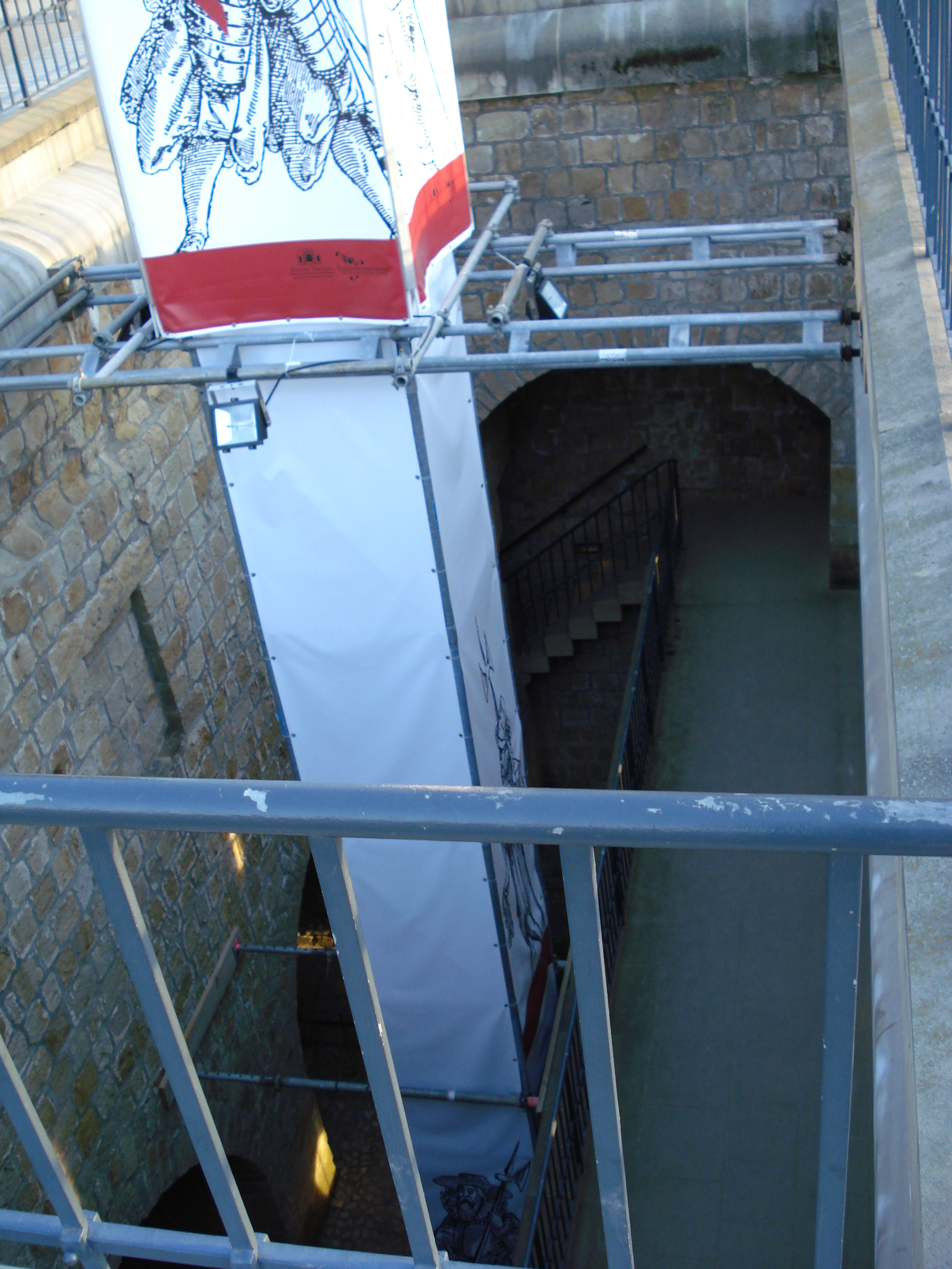 The Brühlich Terrace in Dresden (Saxony).